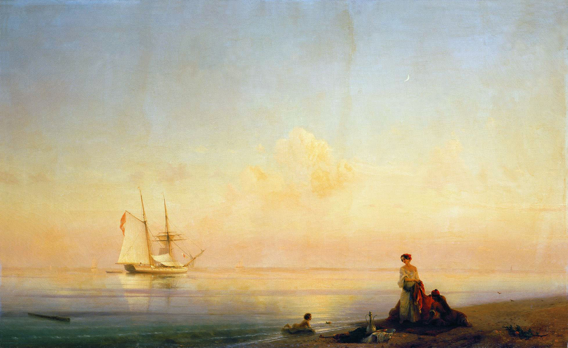 Берег моря. Штиль. 1843 Холст, масло. 114х187см. Государственный Русский музей, Санкт-Петербург